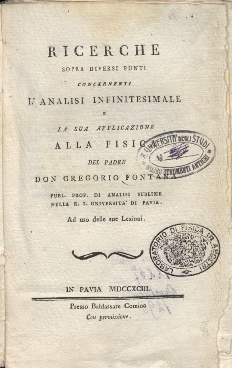 Frontespiece